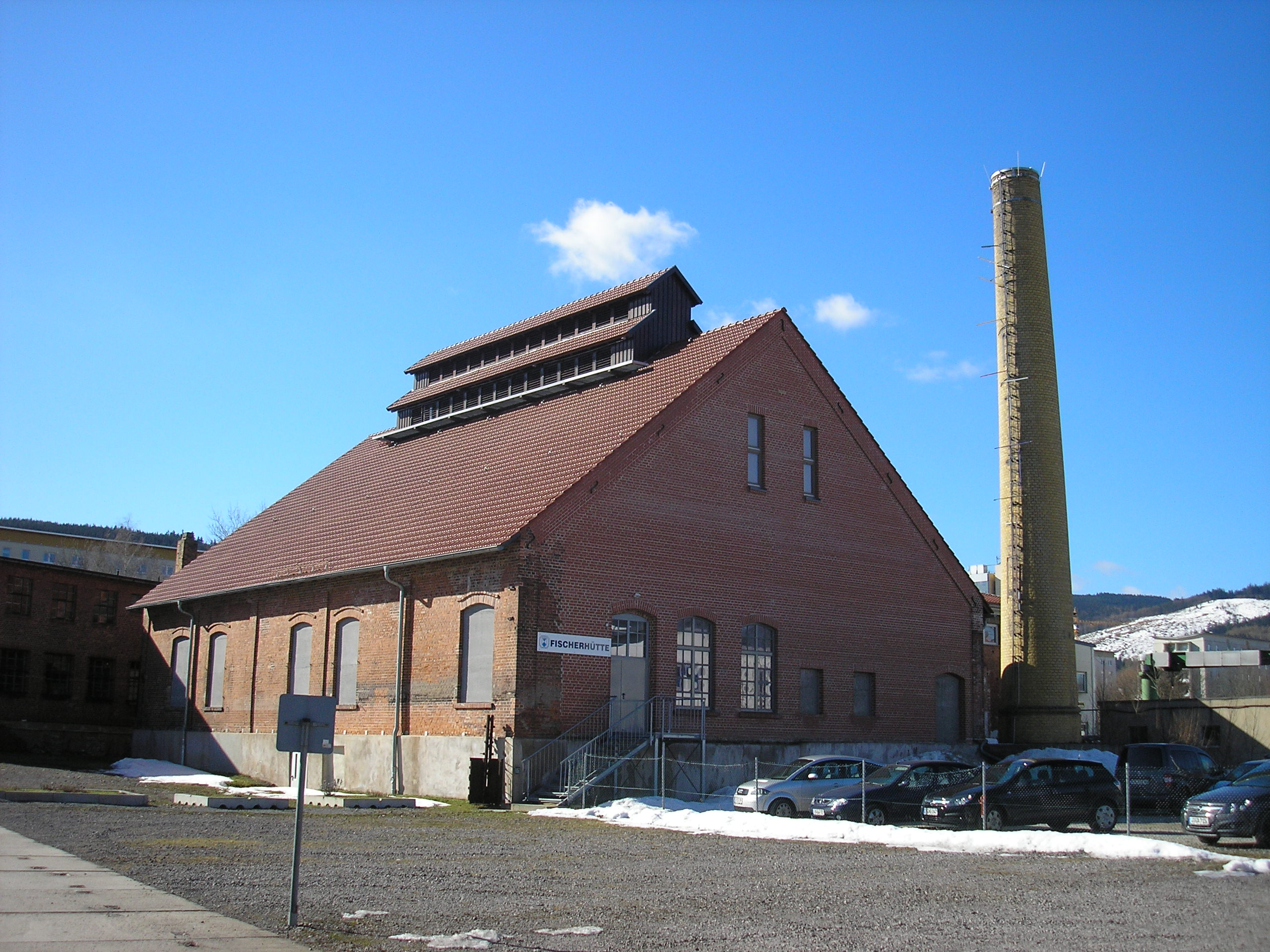 Die Museumsglashütte "Fischerhütte" in Ilmenau (Thüringen).